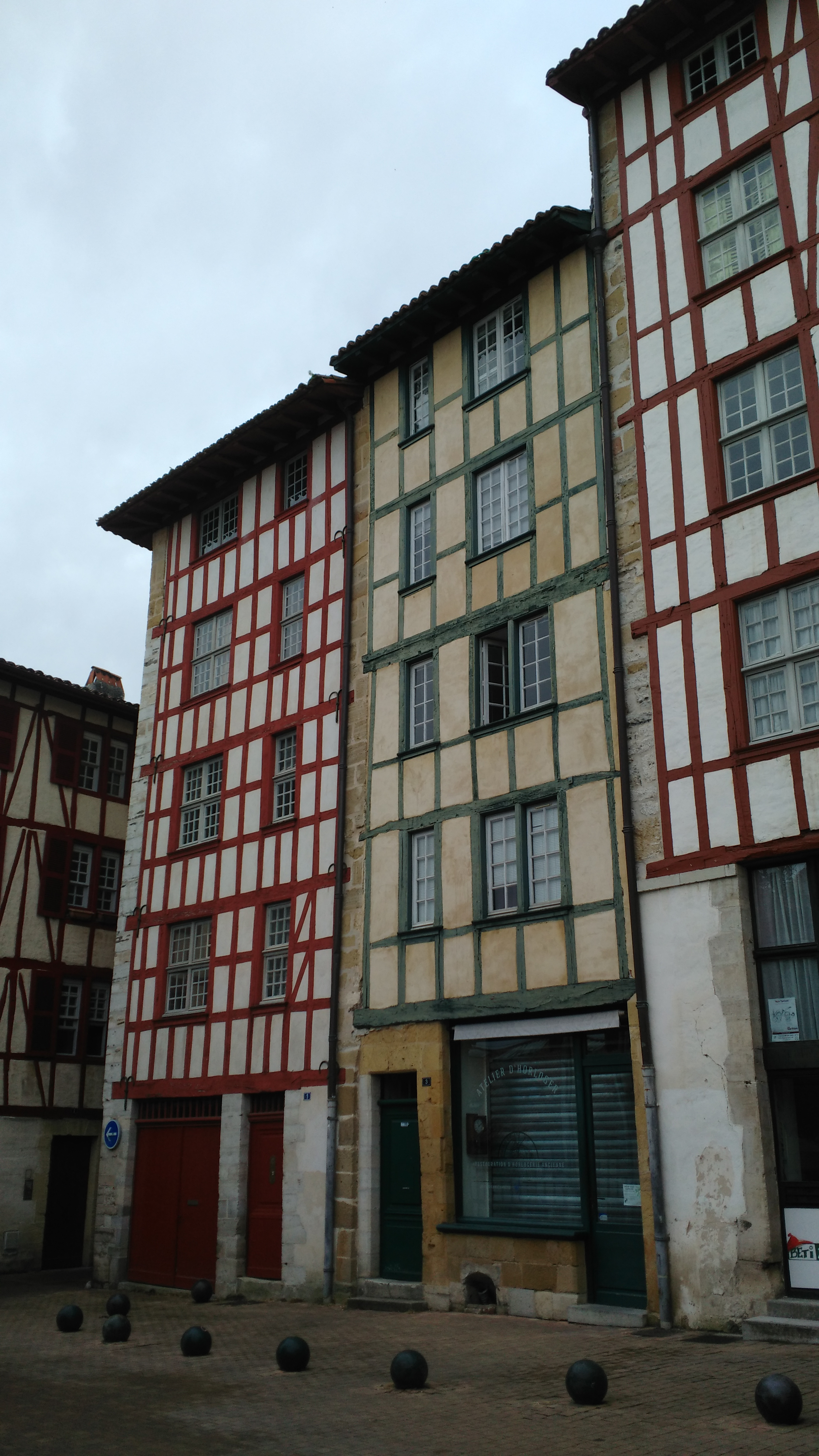 Trois maisons à colombages dans une rue de Bayonne